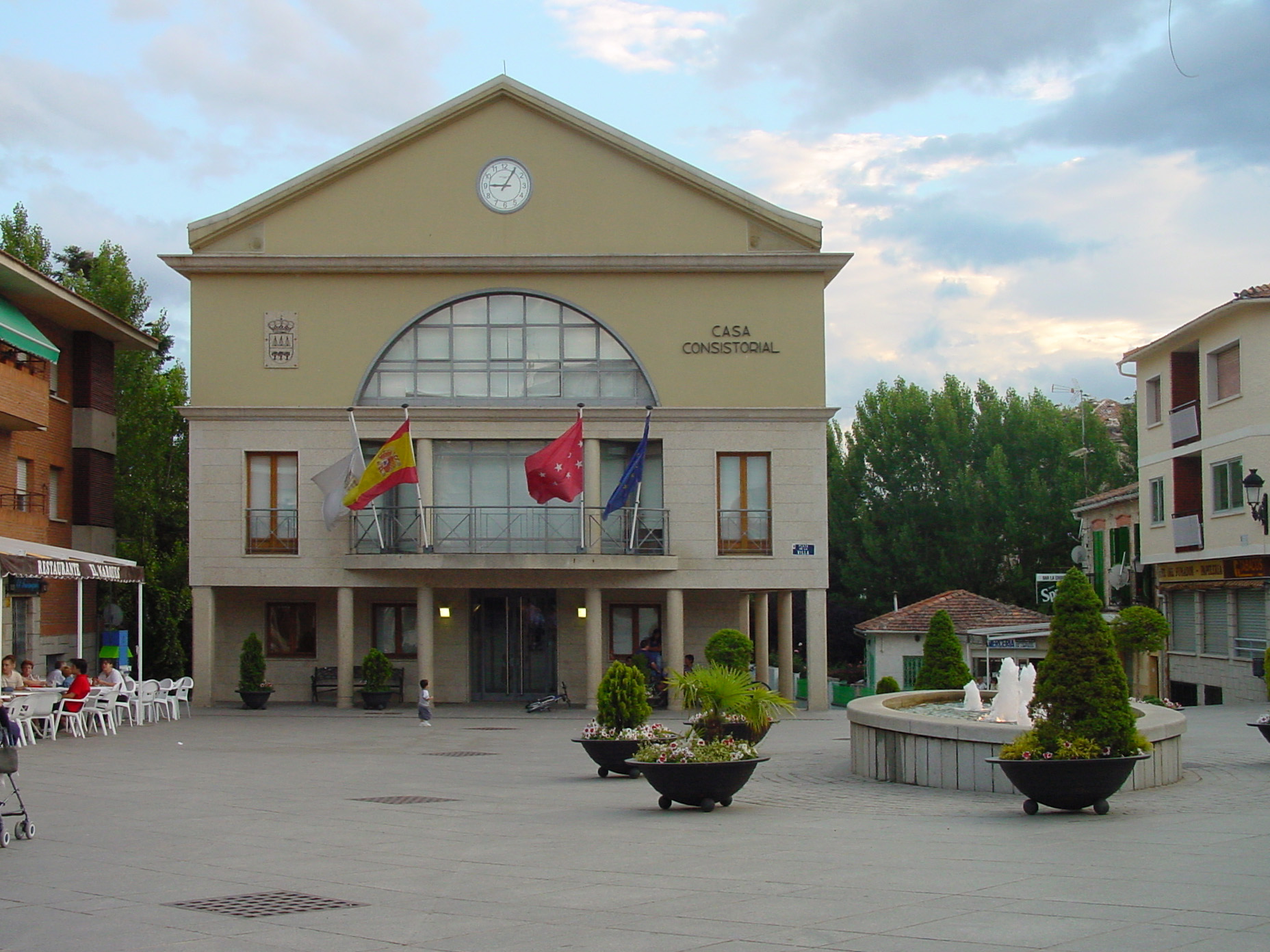 Ayuntamiento de Soto del Real.